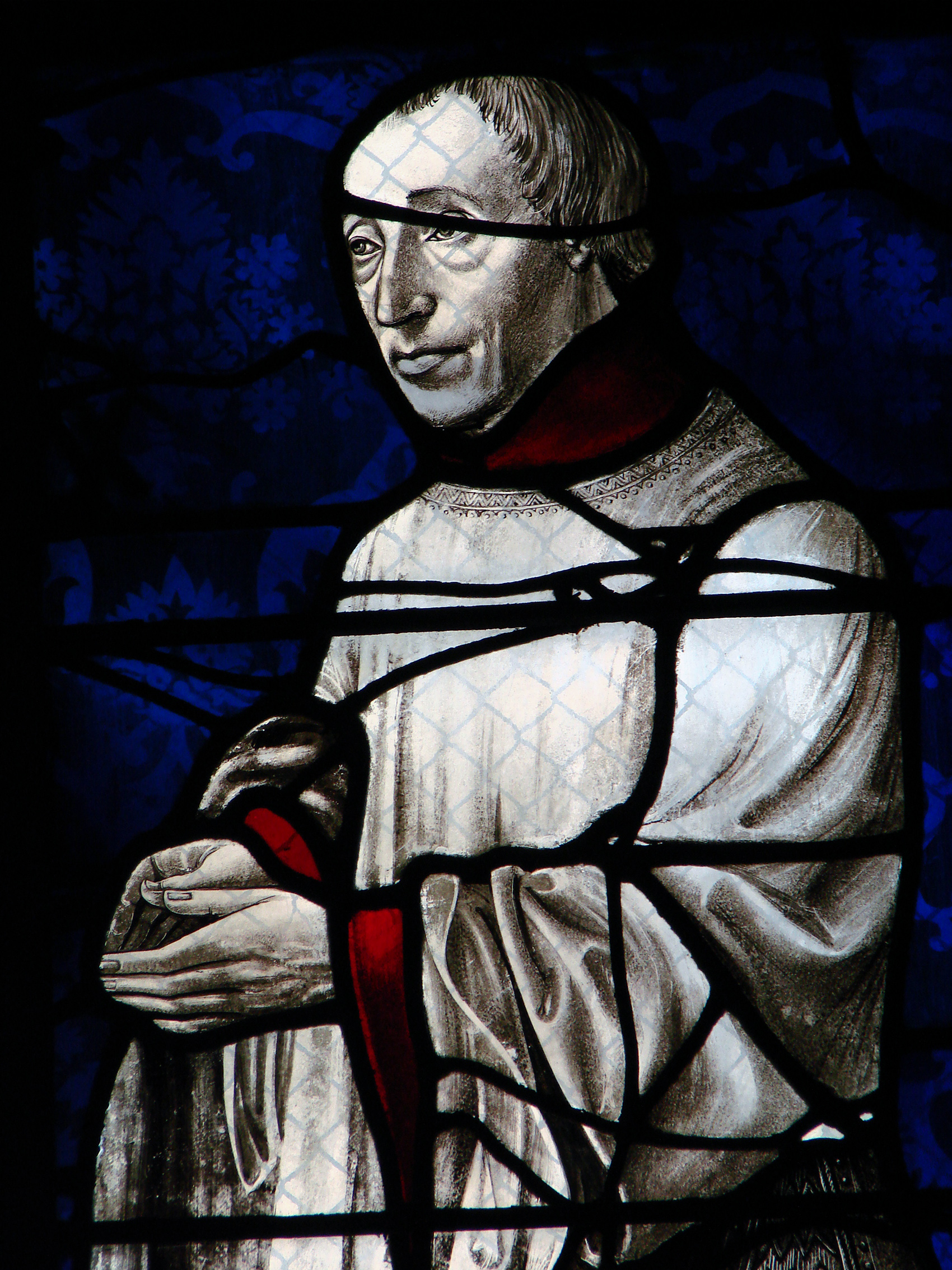 Basilique-cathédrale Notre-Dame de l'Annonciation de Moulins; vitrail de Sainte Catherine, dit vitrail des ducs, fin du 15ème siècle. Détail: le cardinal Charles de Bourbon ( Charles II de Bourbon, 1433-1488).